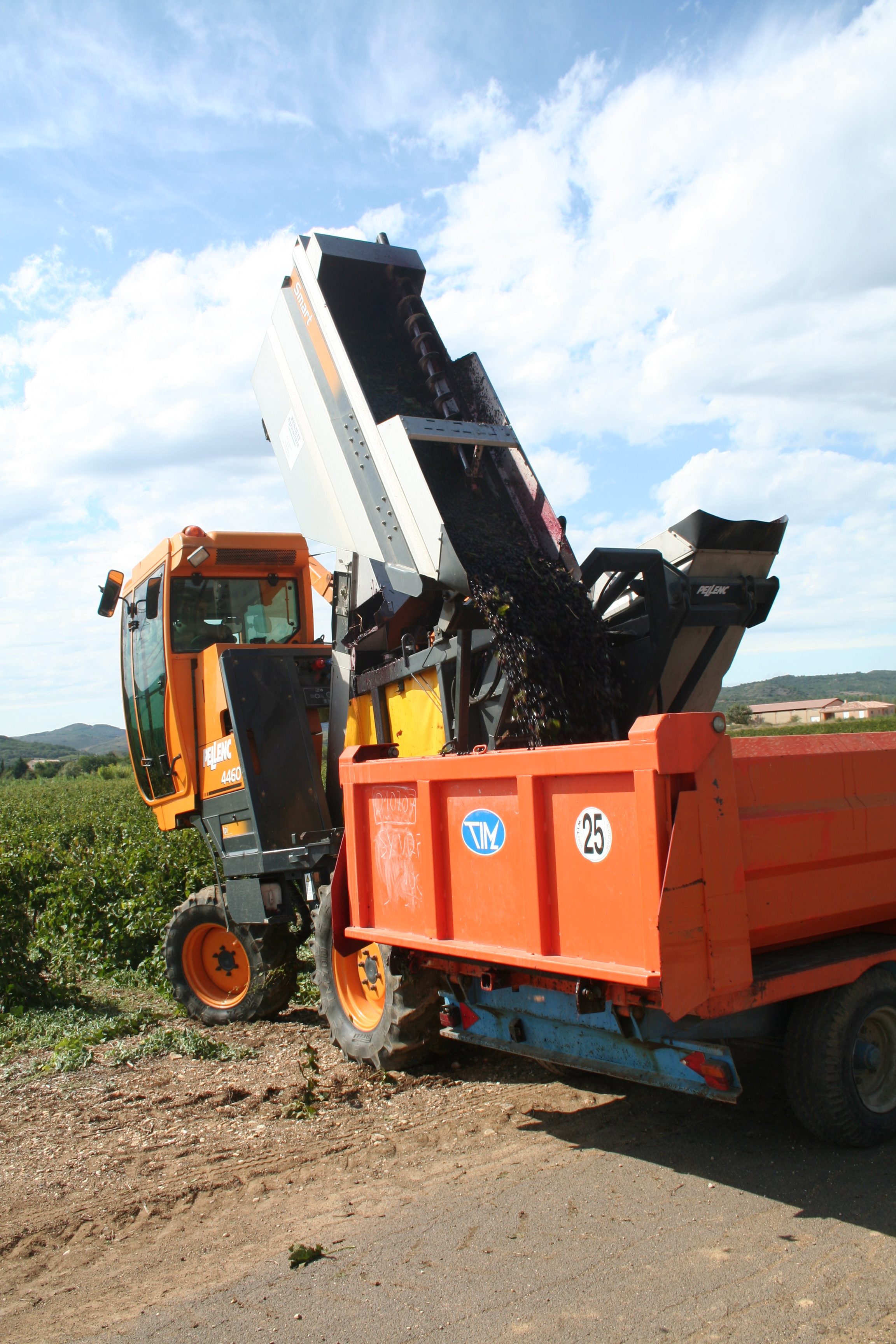 Fontès (Hérault) - transfert des grains de raisin.